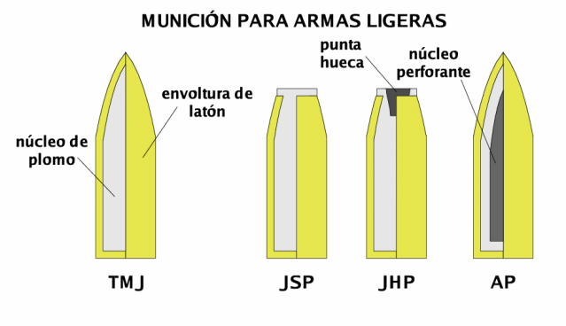 Dibujos realizados por Carlos f. De